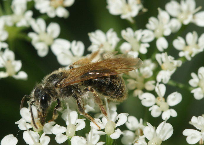 Andrena chrysosceles, male. Location: Valkenburg - Kasteel Schaloen (The Netherlands)